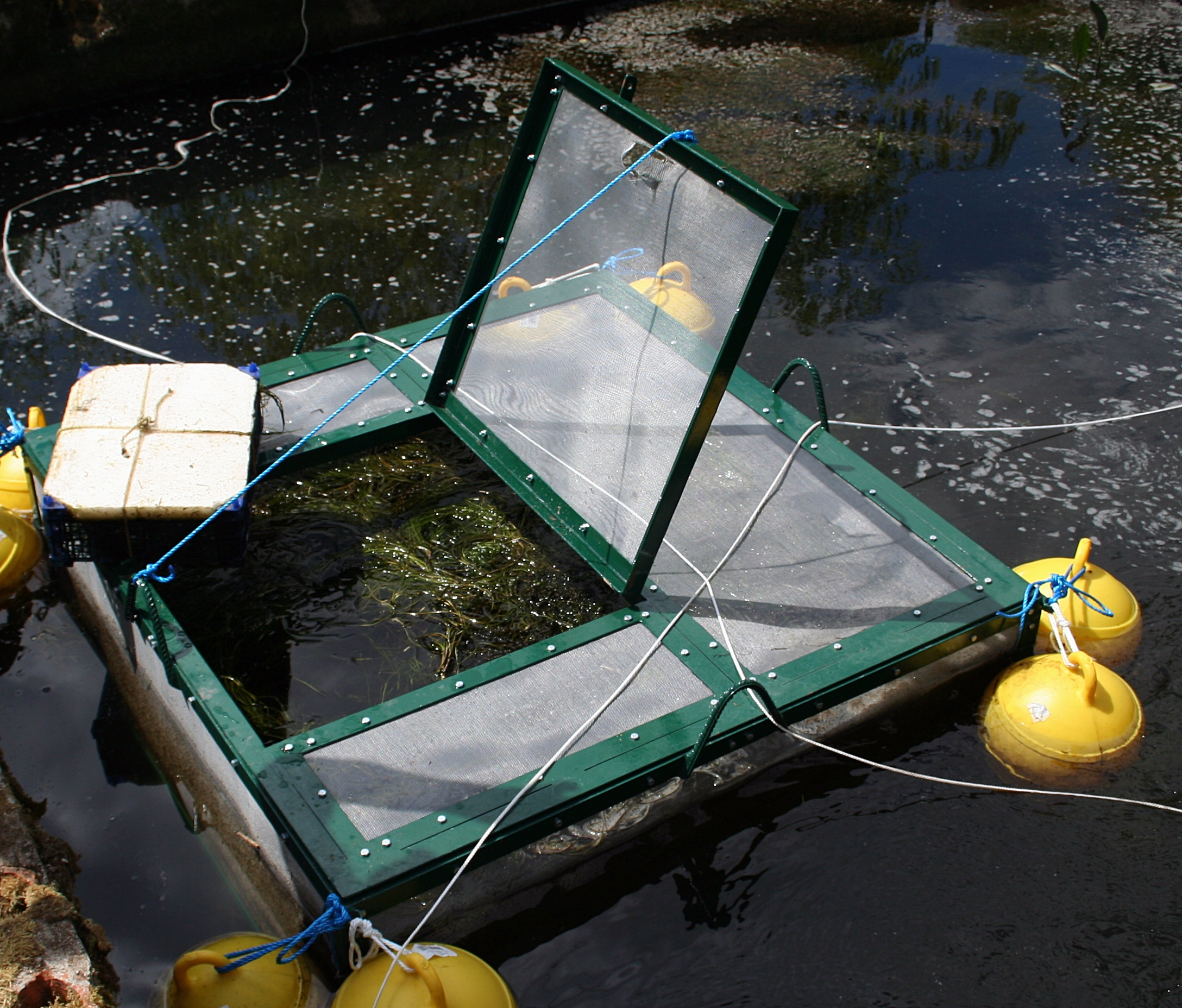 Zaborski Park Krajobrazowy, zbiornik służący do reintrodukcji raka szlachetnego w pobliżu lesnictwa Laska, w malym pojemniku znajdują się samice